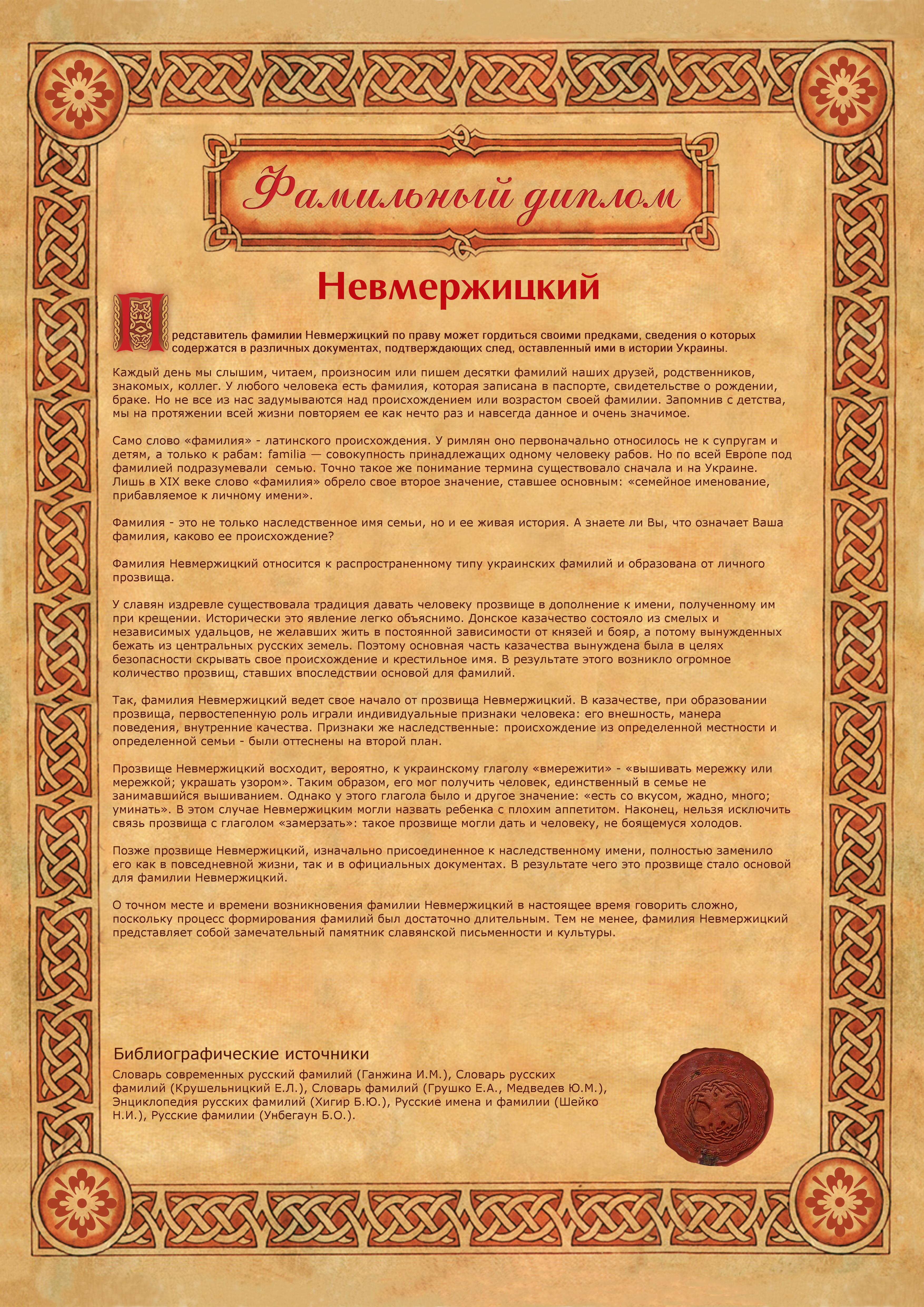 Цей файл був отриманий на платній основі від одного з сайтів що пропонують "Фамільні дипломи"